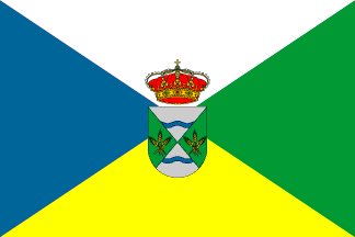 Bandera y escudo del ayuntamiento de Turcia.